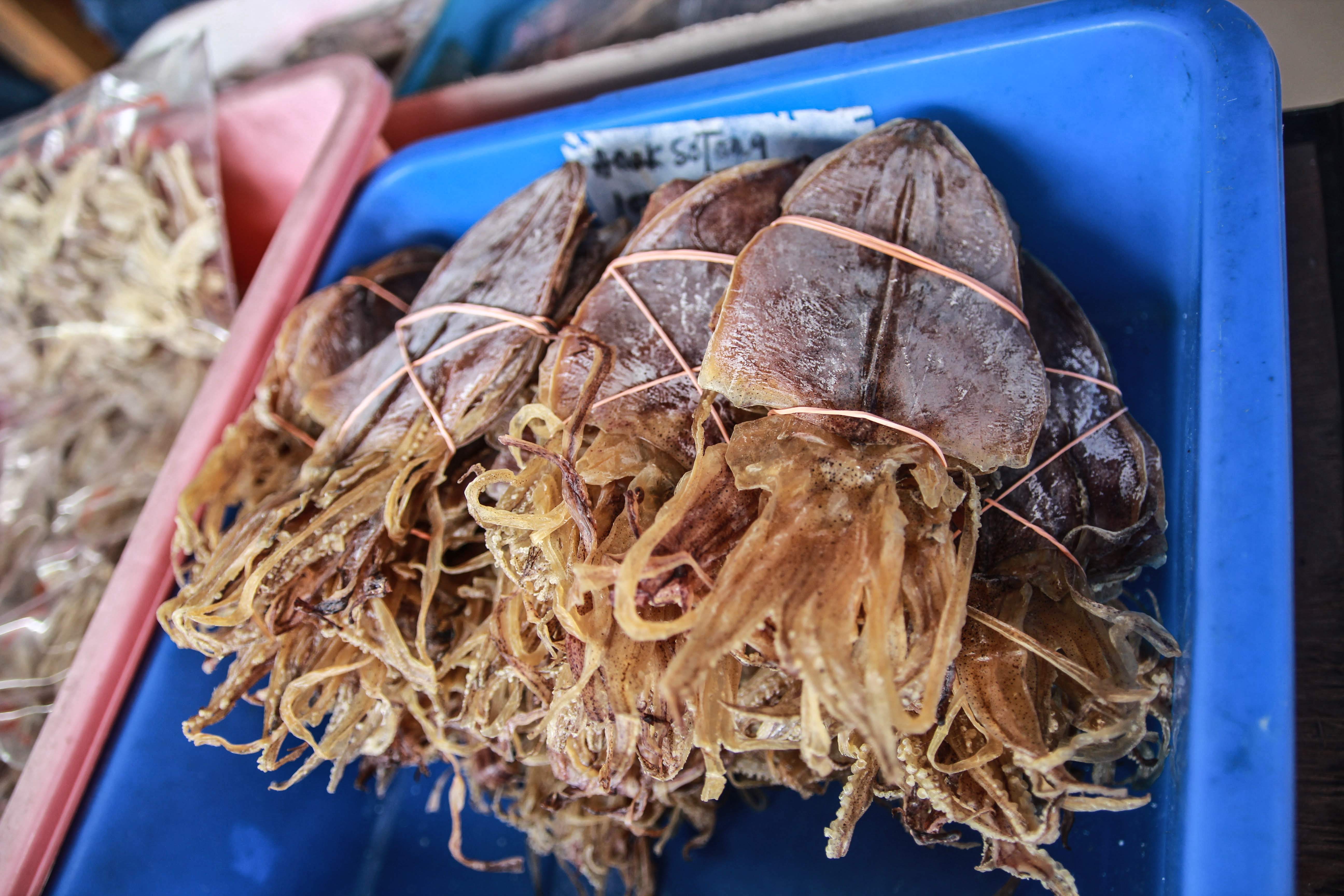 Trockenfisch - Pulau Pangkor, Malaysia